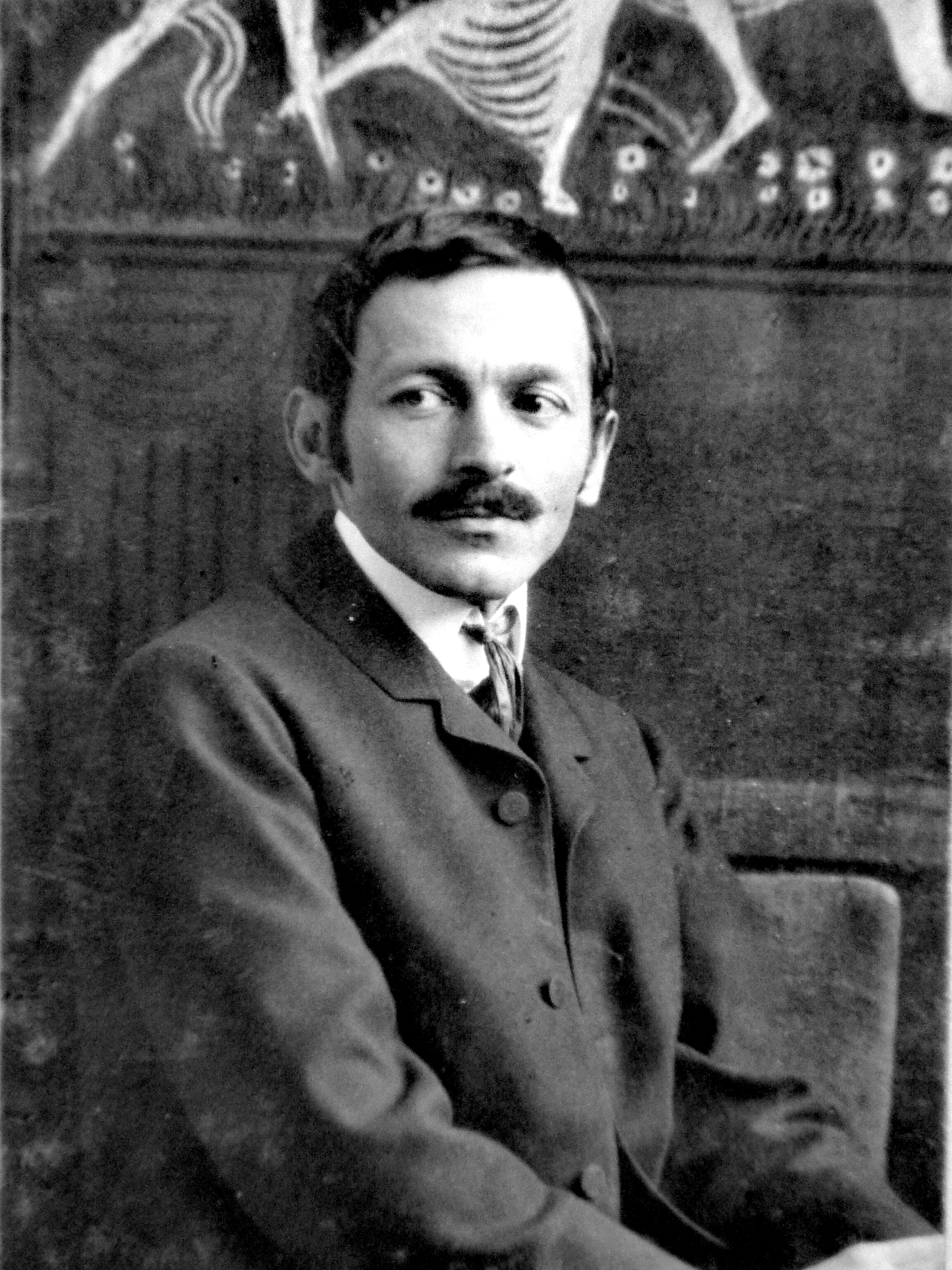 Der Bildhauer und Künstler Ignatius Taschner im Alter von rund 30 Jahren.